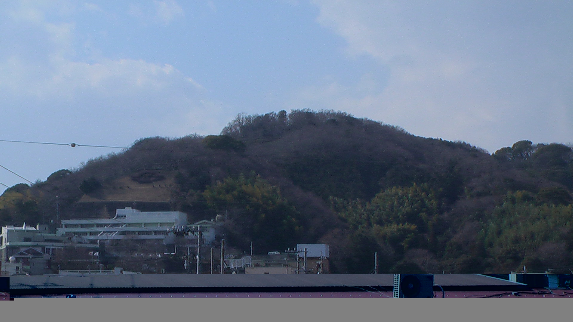 神奈川県二宮町の吾妻山です。